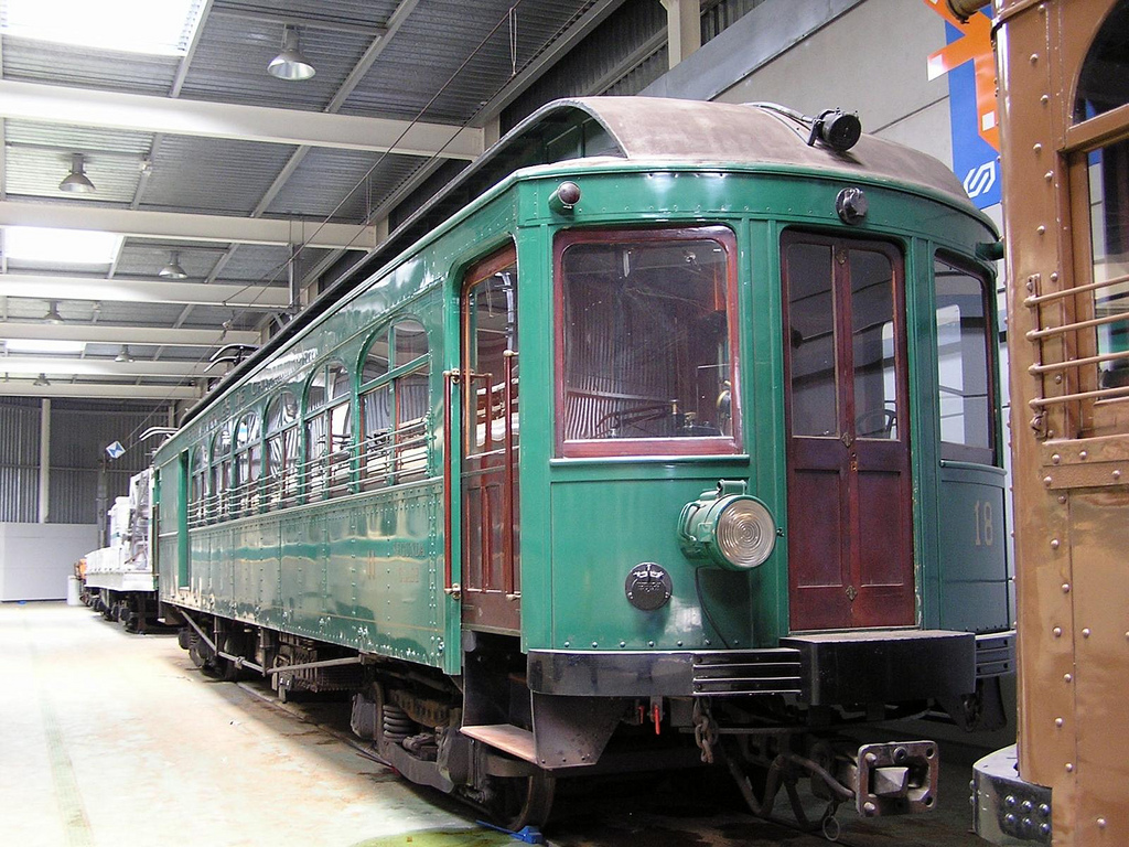 Brill n18 de Ferrocarrils de Catalunya